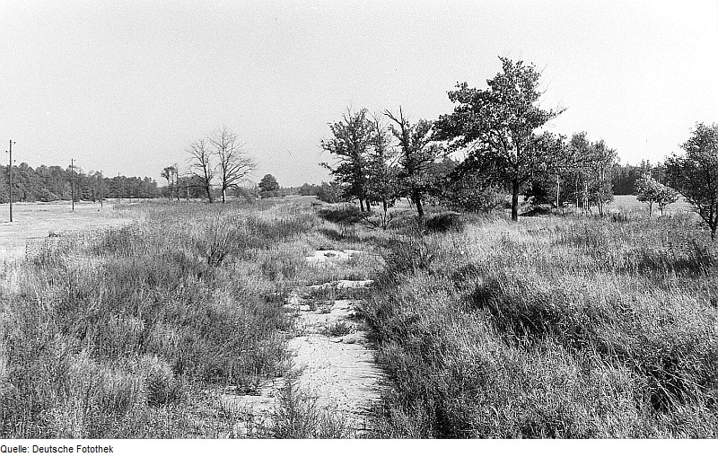 Original image description from the Deutsche Fotothek Wunscha. Leeres Bett des Weißen Schöps